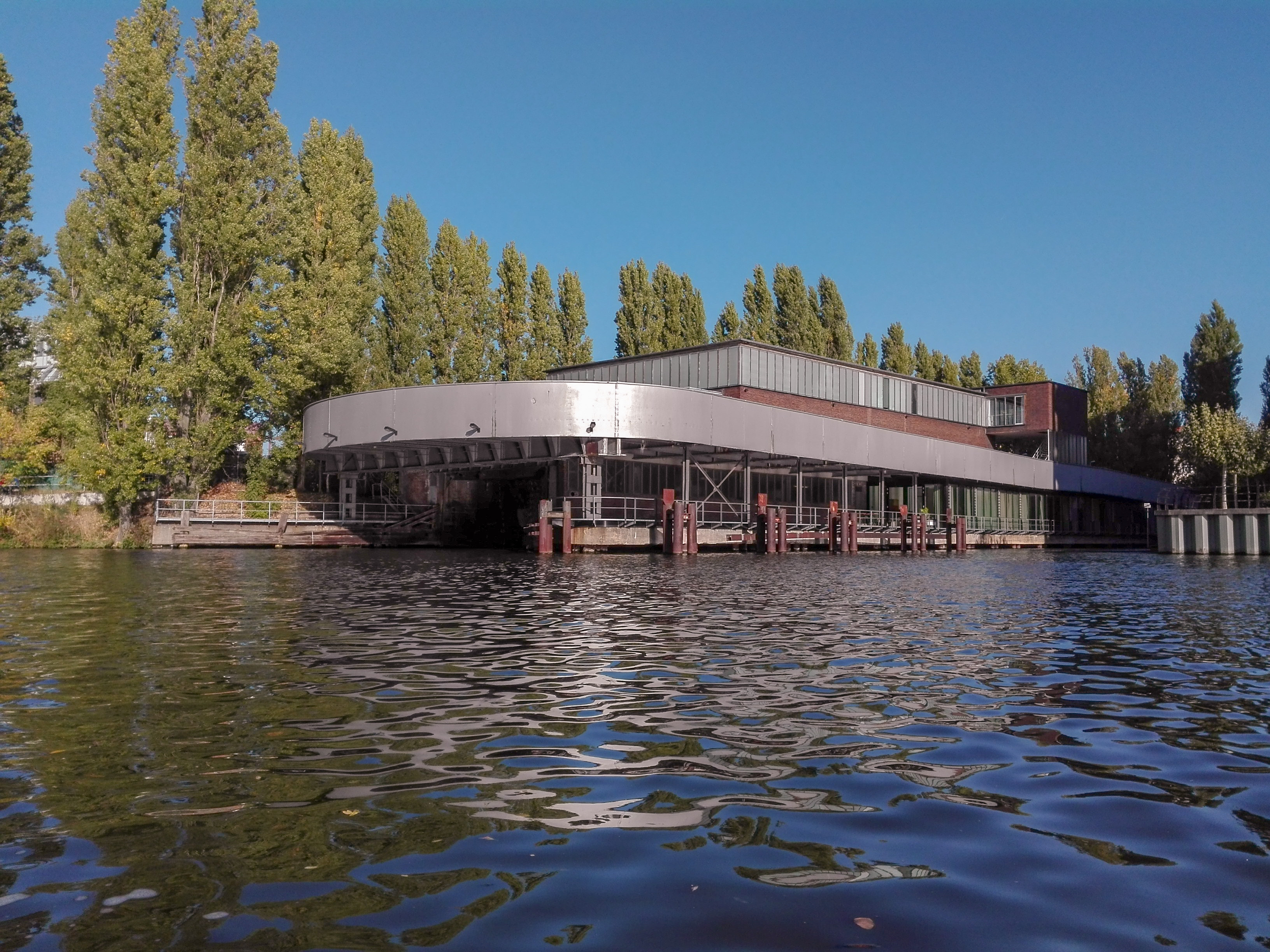 Ehemalige Müllverladestation an der Spree. Erbaut 1936 - 1937. Architekt: Paul Baumgarten. Heutige Nutzung: ArchitekturbüroThis is a photograph of an architectural monument.